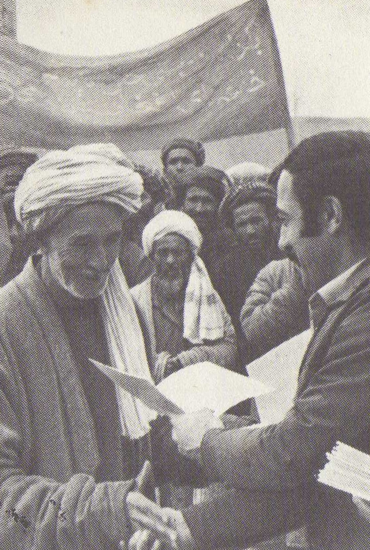 Fotografía de la entrega de tierra a un campesino afgano, 1978. Esta foto fue publicada en Argentina, por lo tanto rige su ley de copyright.